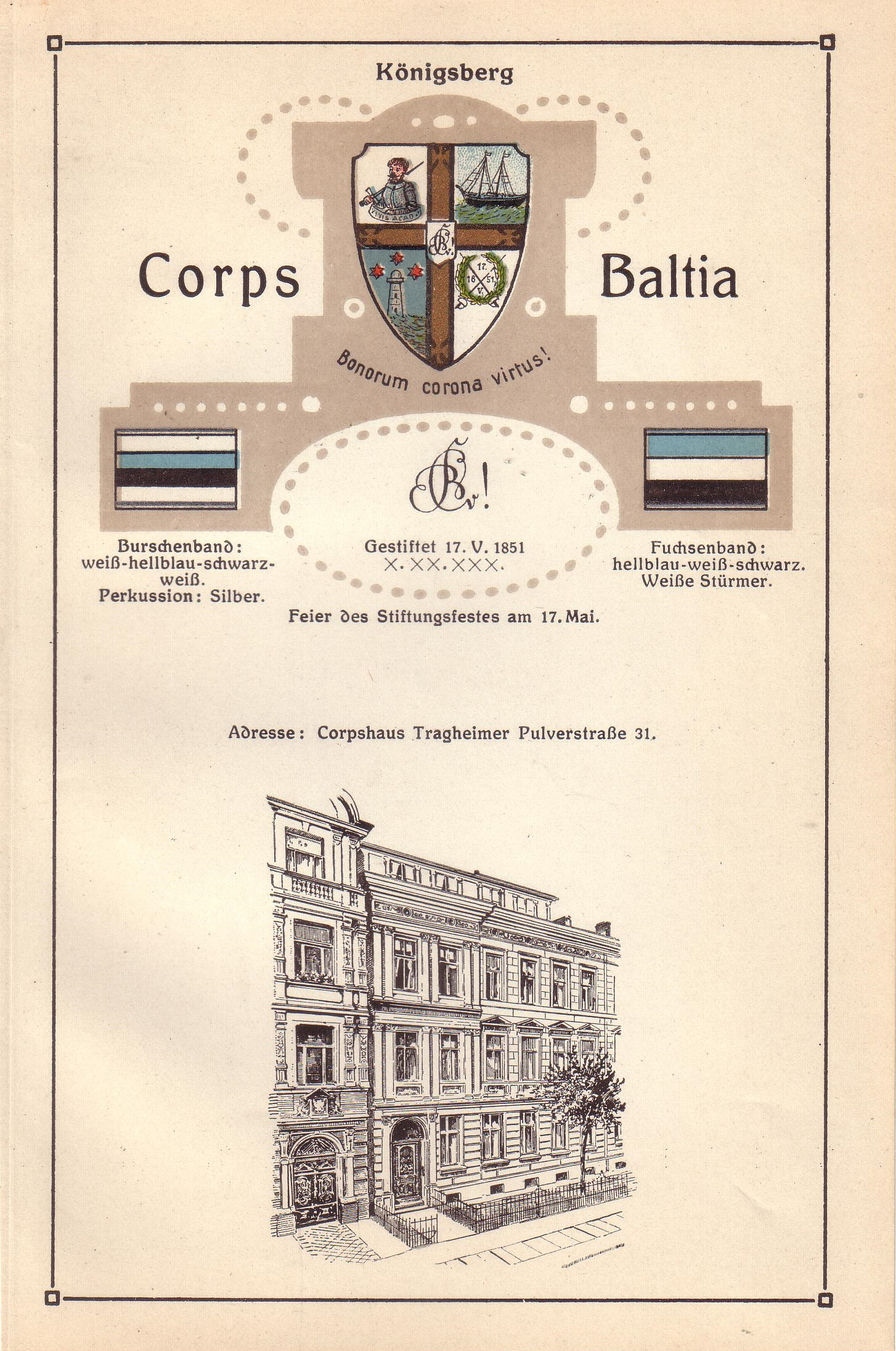 Wappen, Farben und Corpshaus des Corps Baltia Königsberg